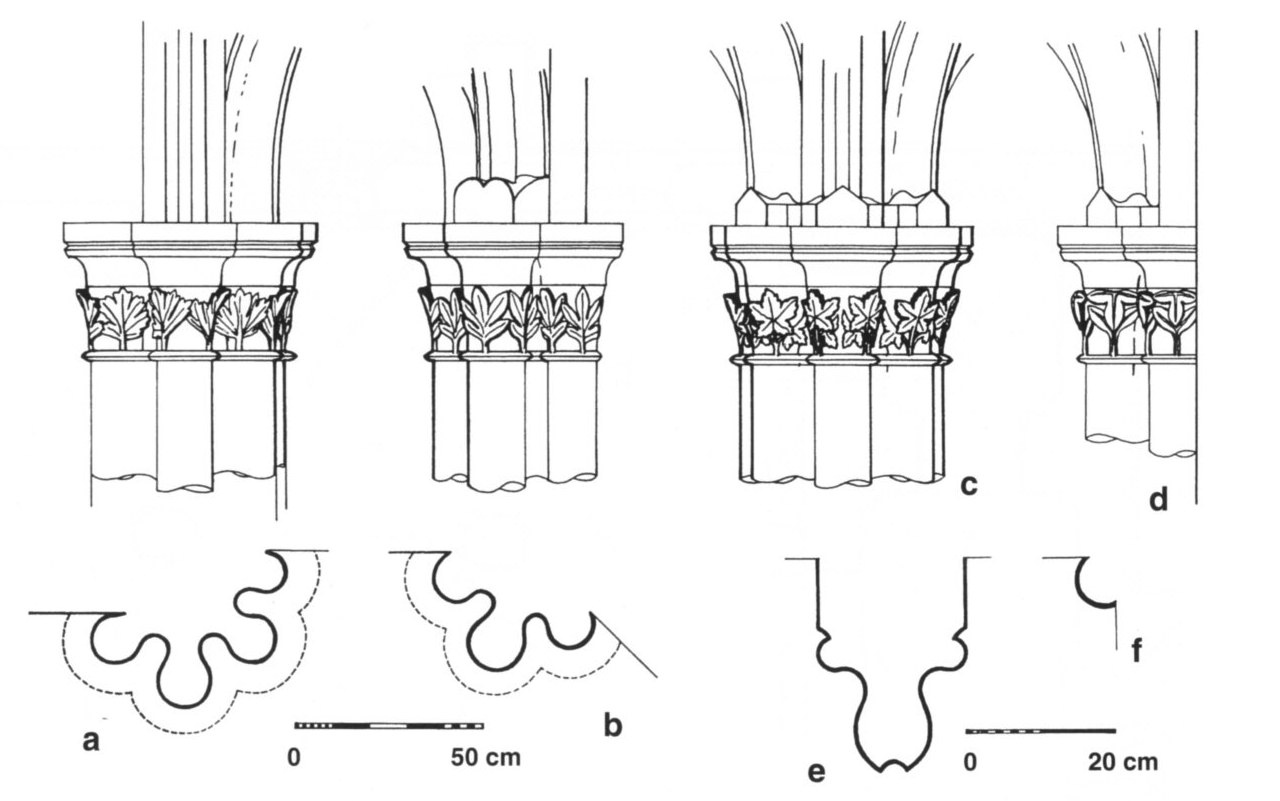 arch detaily